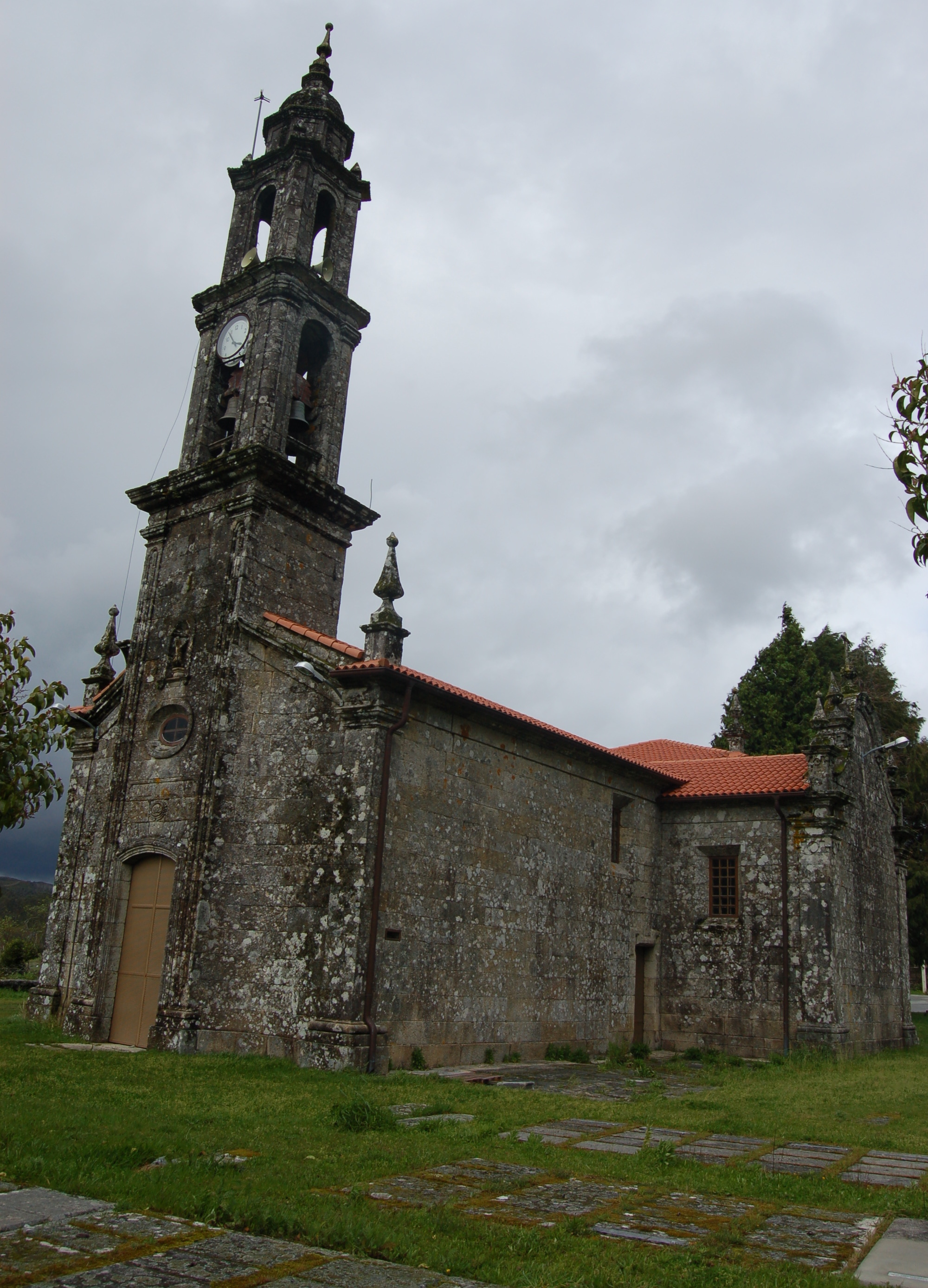 Igrexa parroquial de Santo André de Valongo (Cerdedo-Cotobade)